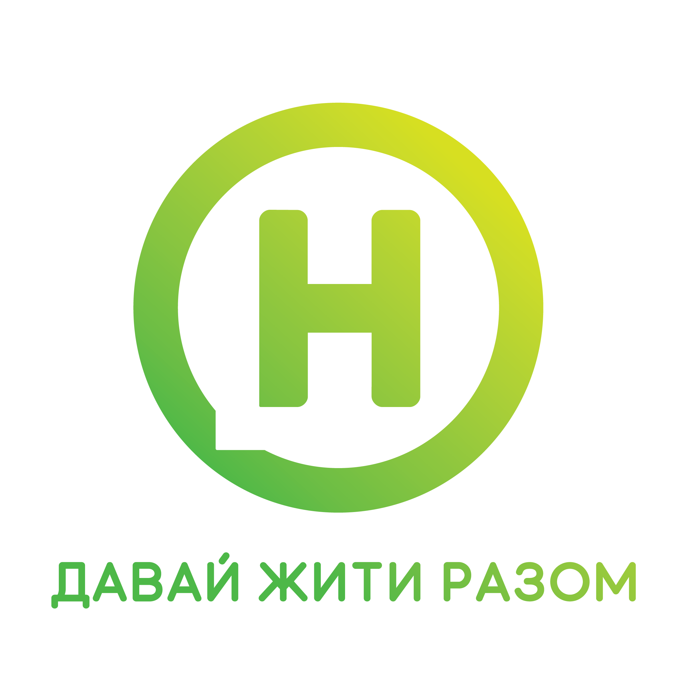 Логотип "Нового каналу" з 2018 року